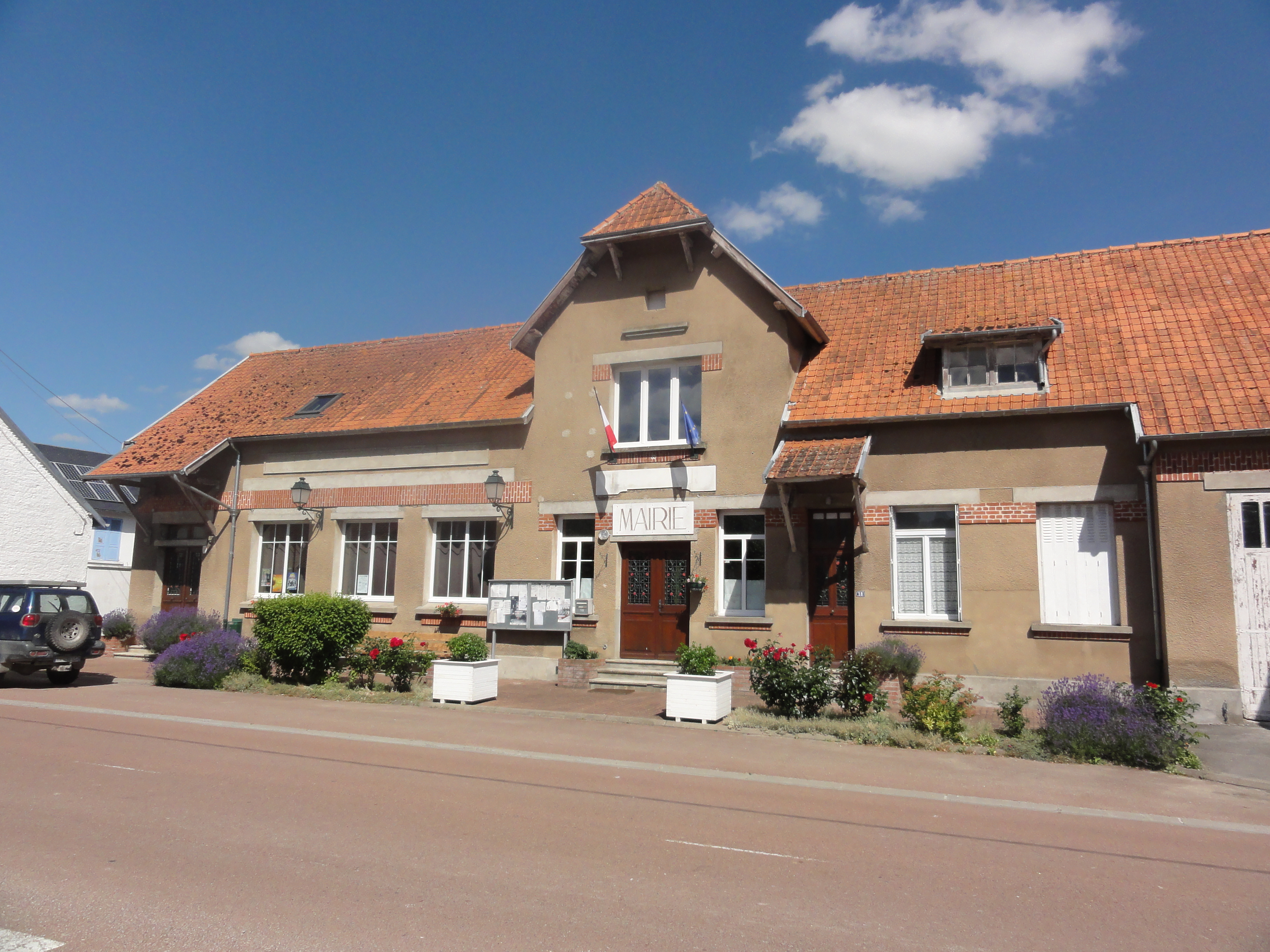 Berrieux (Aisne) mairie